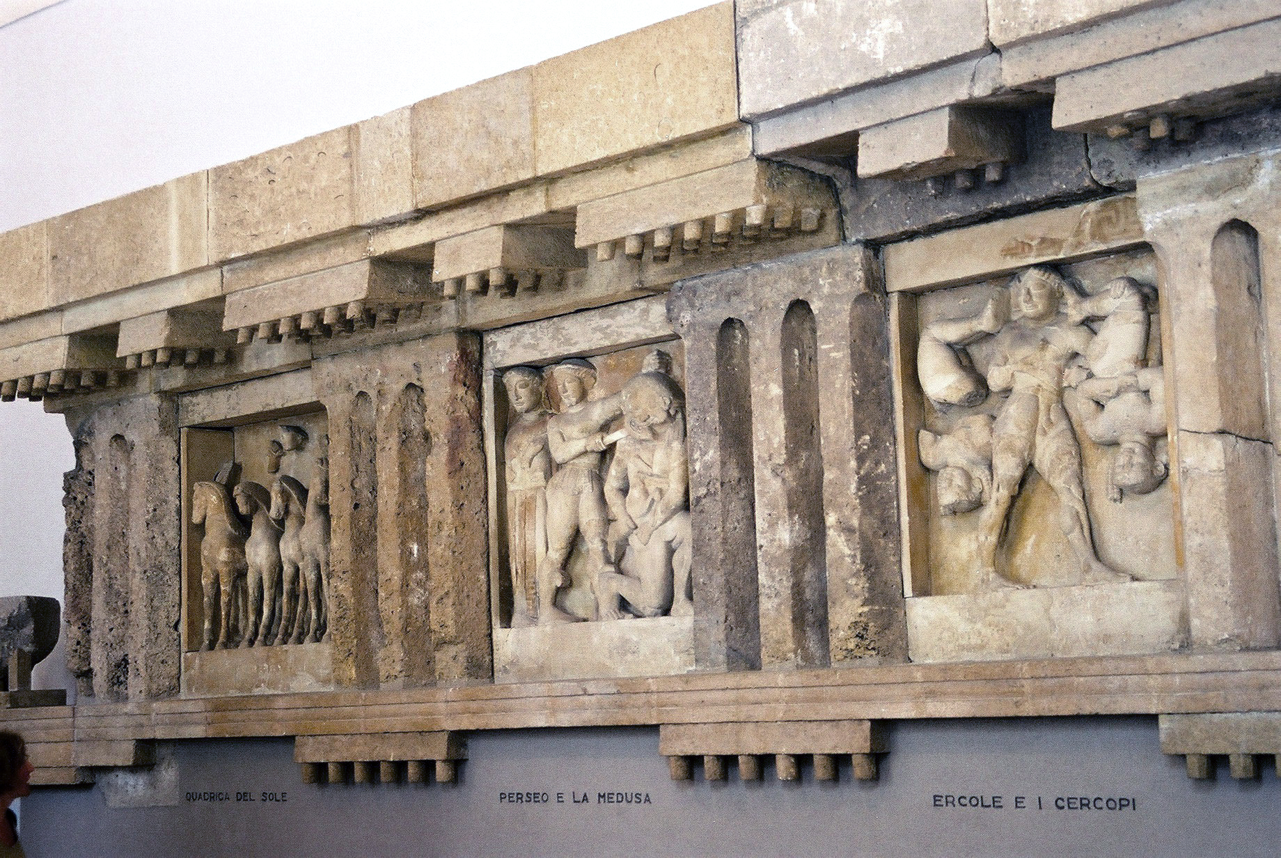 Museo Regionale Archeologico, Palermo. Metopes from temple C of Selinunte.